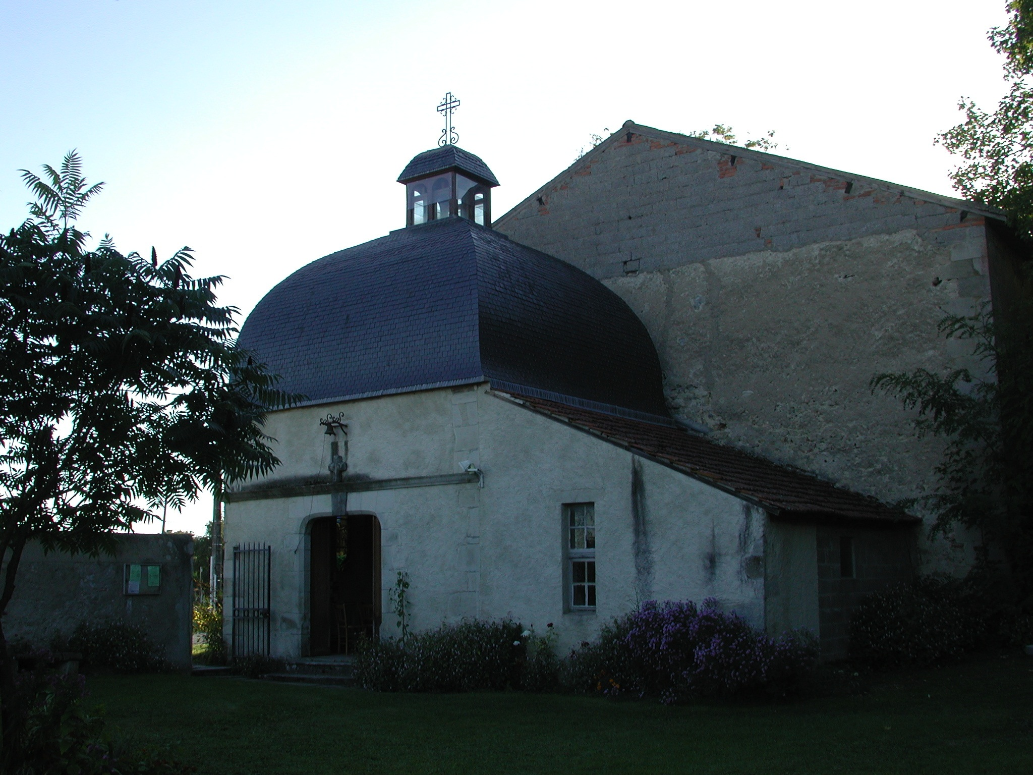 Prieuré Notre-Dame de Banelle, au village de Banelle, commune d'Escurolles (Allier, France).